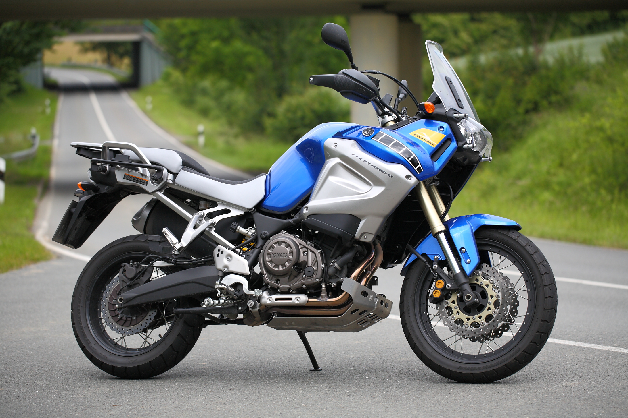 Yamaha XT 1200 Z Super Ténéré - Die rechte Seitenansicht